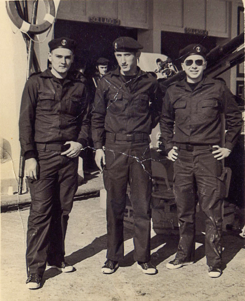 Soldados en el cuartel de Marinería de San Fernando (España) durante su servicio militar, en 1978.